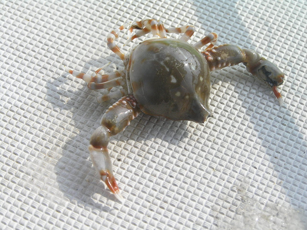 ツノナガコブシ Leucosia anatum (Herbst,1783)